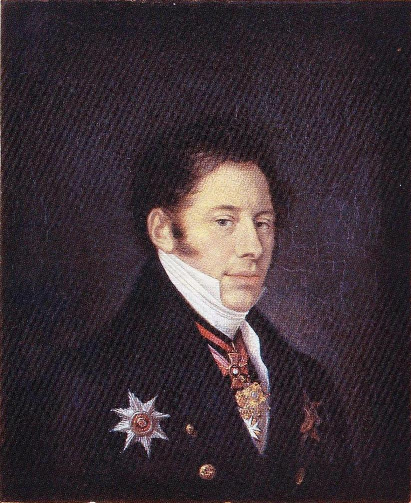 Senaattori Otto Wilhelm Klinckowström (1778–1850).